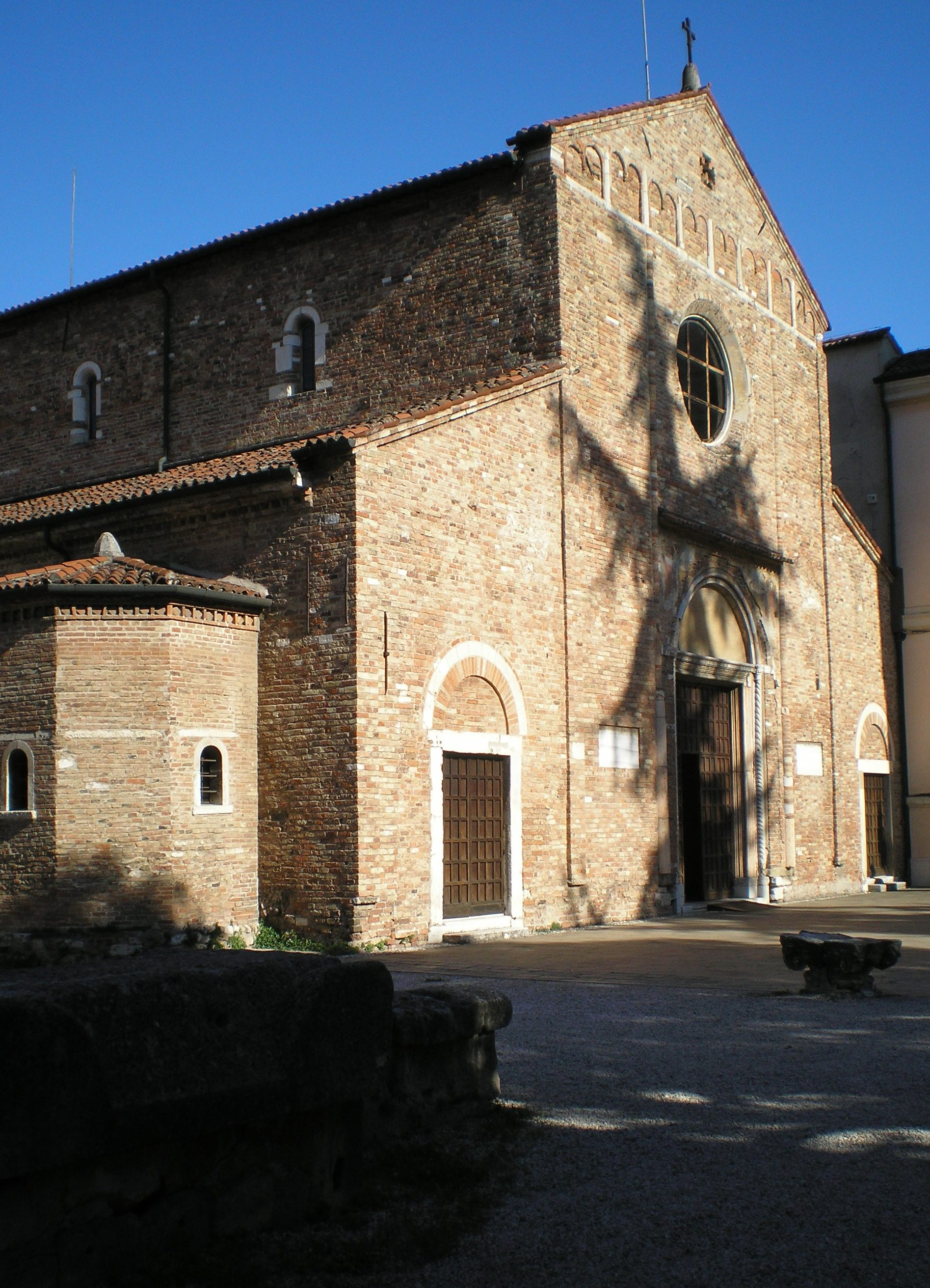 Torre campanile della Basilica dei santi Felice e Fortunato (Vicenza) OLYMPUS DIGITAL CAMERA